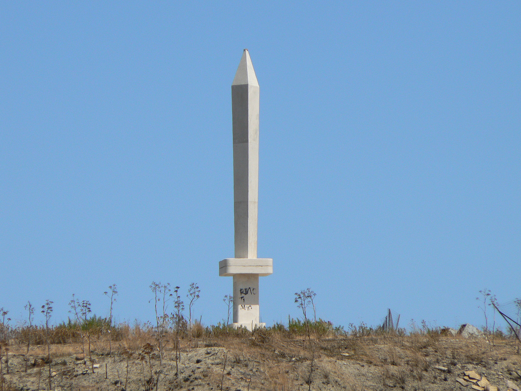 Il "gladio" sulla collina visibile da tutta Crotone.